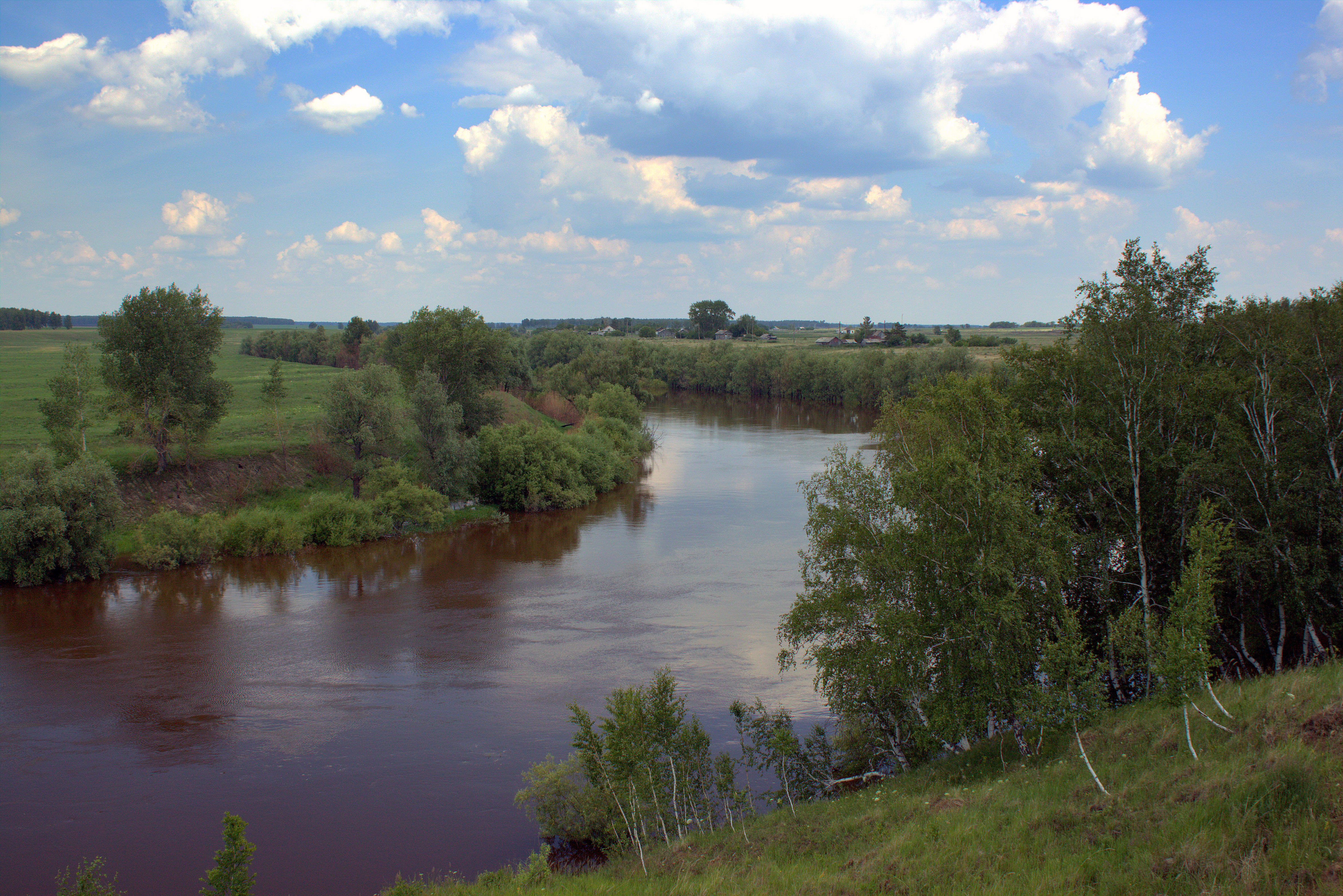 Река Омь у деревни Старая Рига.